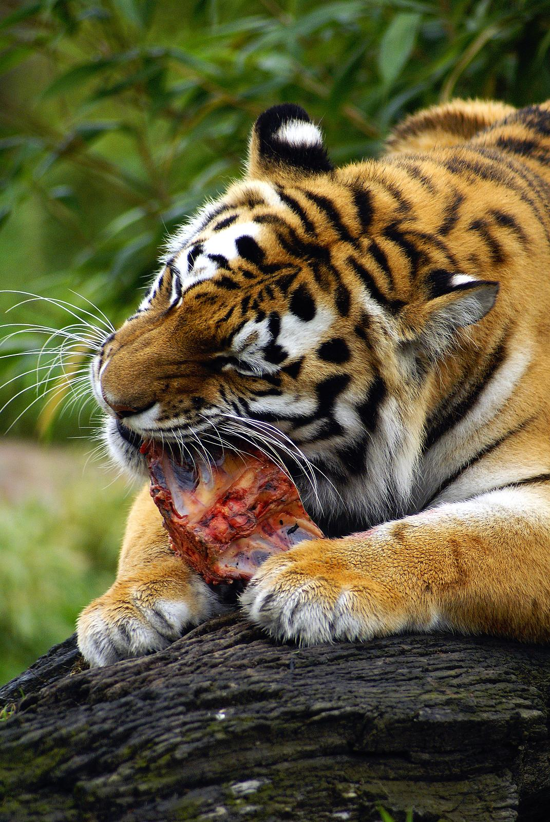 Colchester Zoo Essex